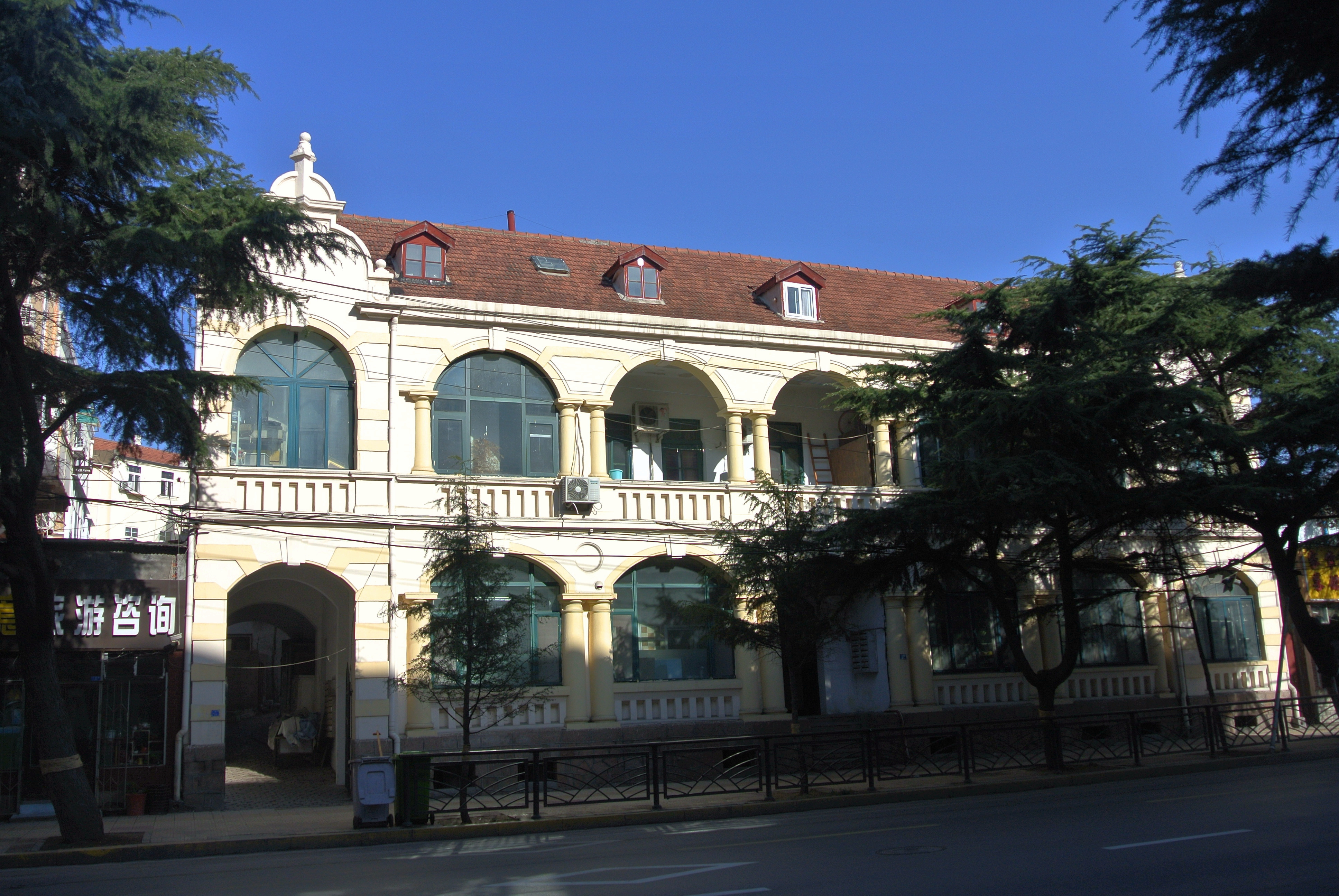 青岛广西路9号